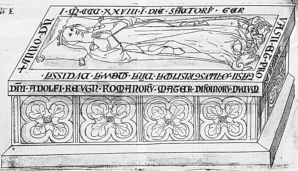 Tekening van de graftombe van Mechtild van Nassau in klooster Klarenthal uit het Epitaphienbuch van Heinrich Dors